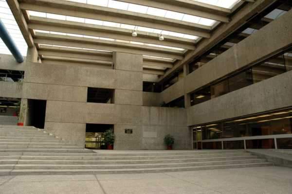 Explanada de El Colegio de México.